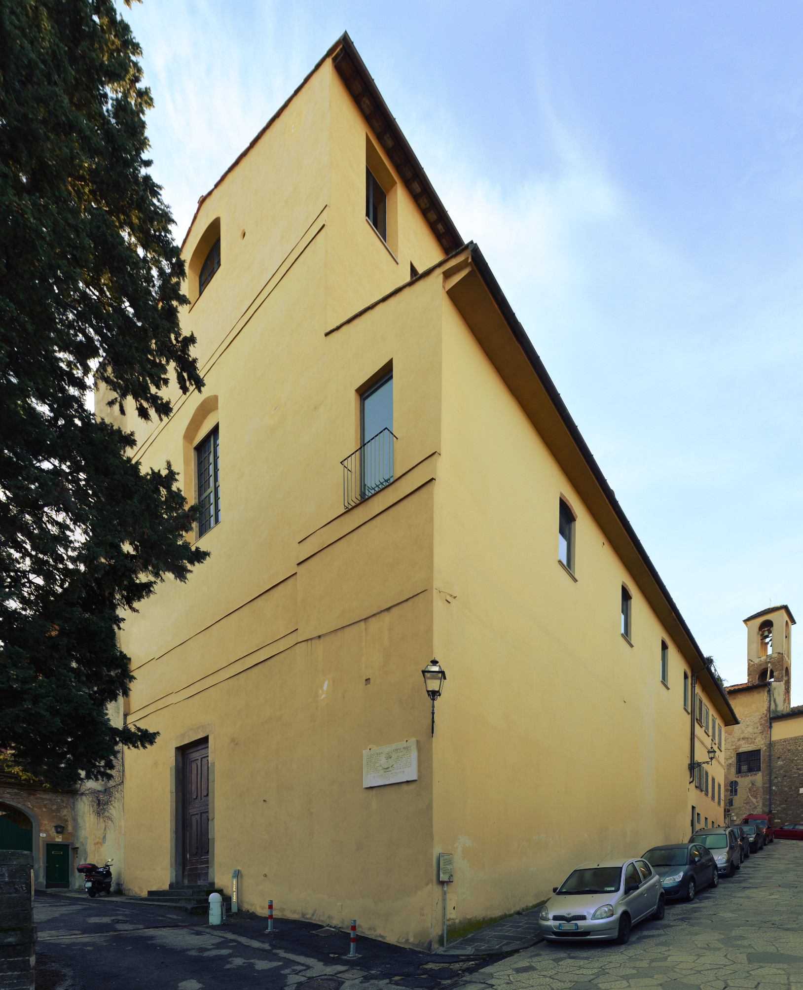 Veduta esterna con Costa Scarpuccia. Sulla destra, il campanile della chiesa di San Giorgio alla Costa, in Costa San Giorgio.